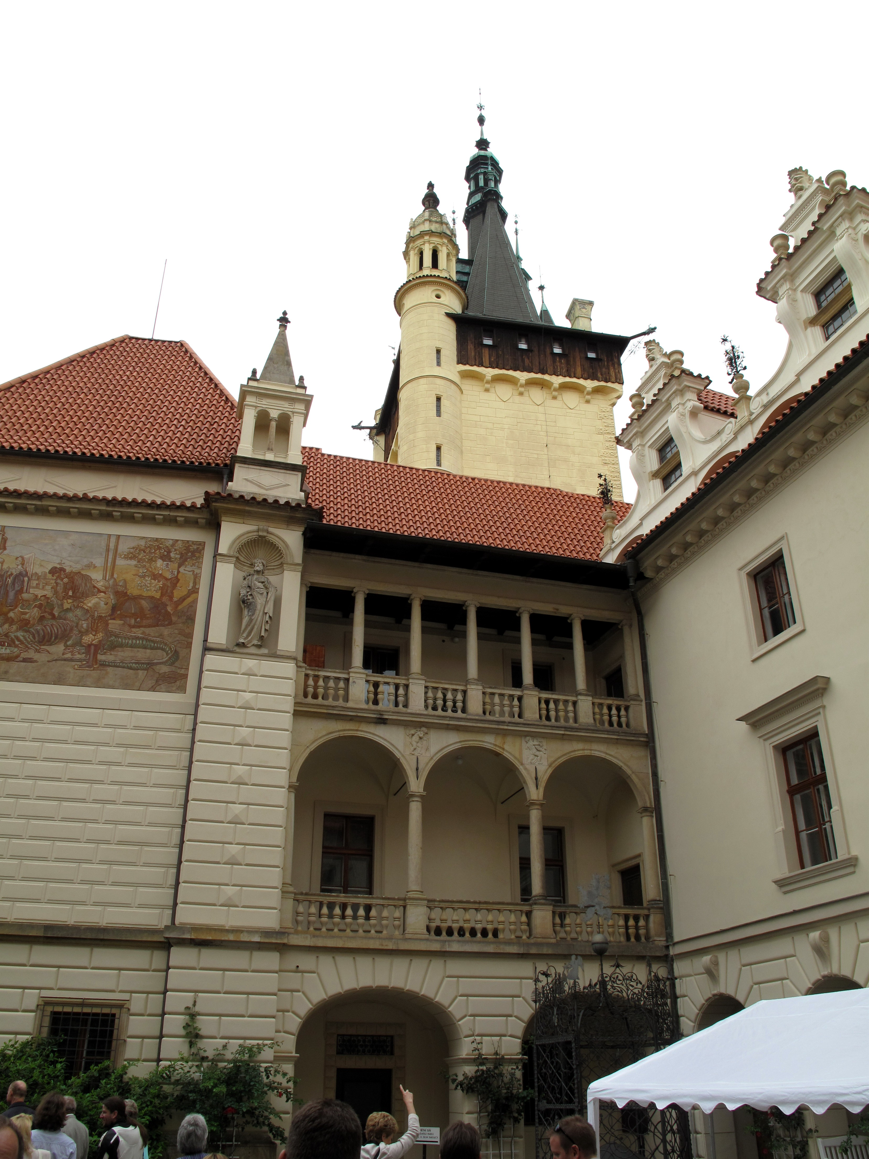 Průhonice, zámek